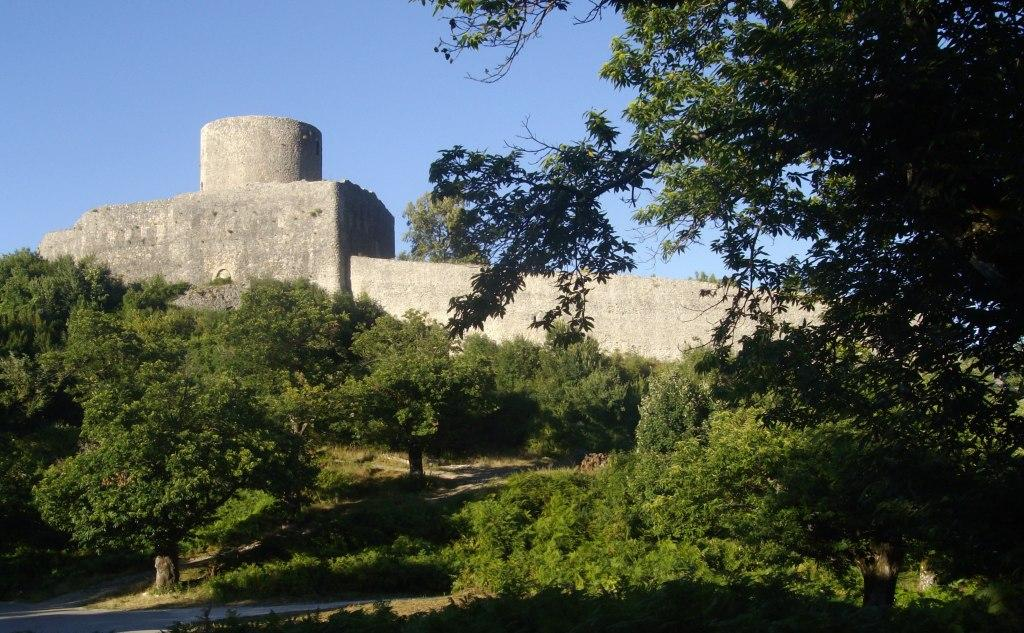 Castello longobardo del Monte a Montella (VI - X sec.). Opera propria.